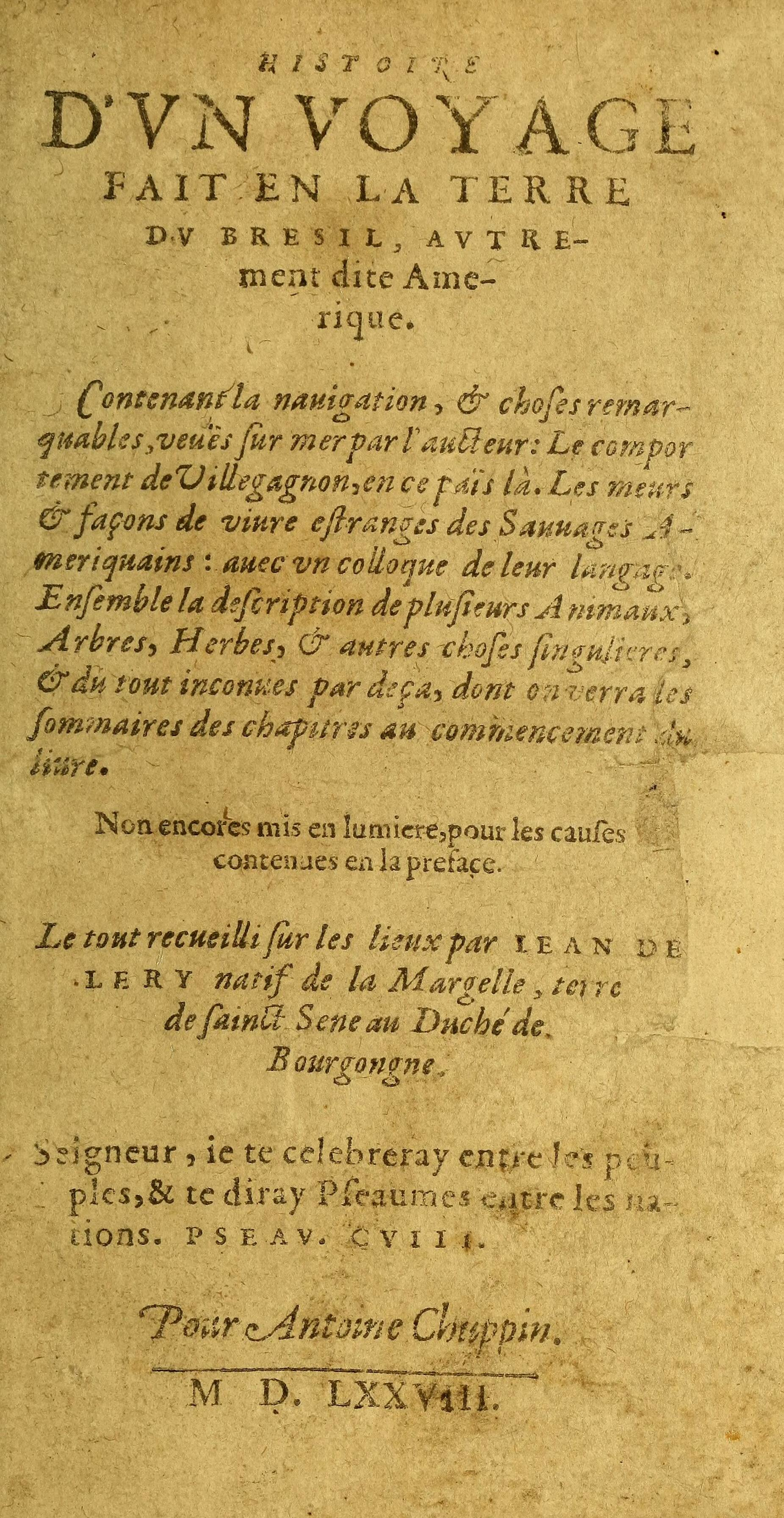 Jean de Lery, Histoire_d'un_voyage en terre de Brésil, 1st ed., 1578, title page